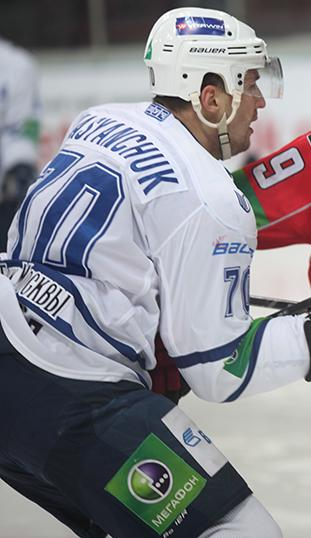 Нападающий московского «Динамо» Константин Касянчук во время матча чемпионата КХЛ против новокузнецкого «Металлурга» 21 декабря 2012 года.